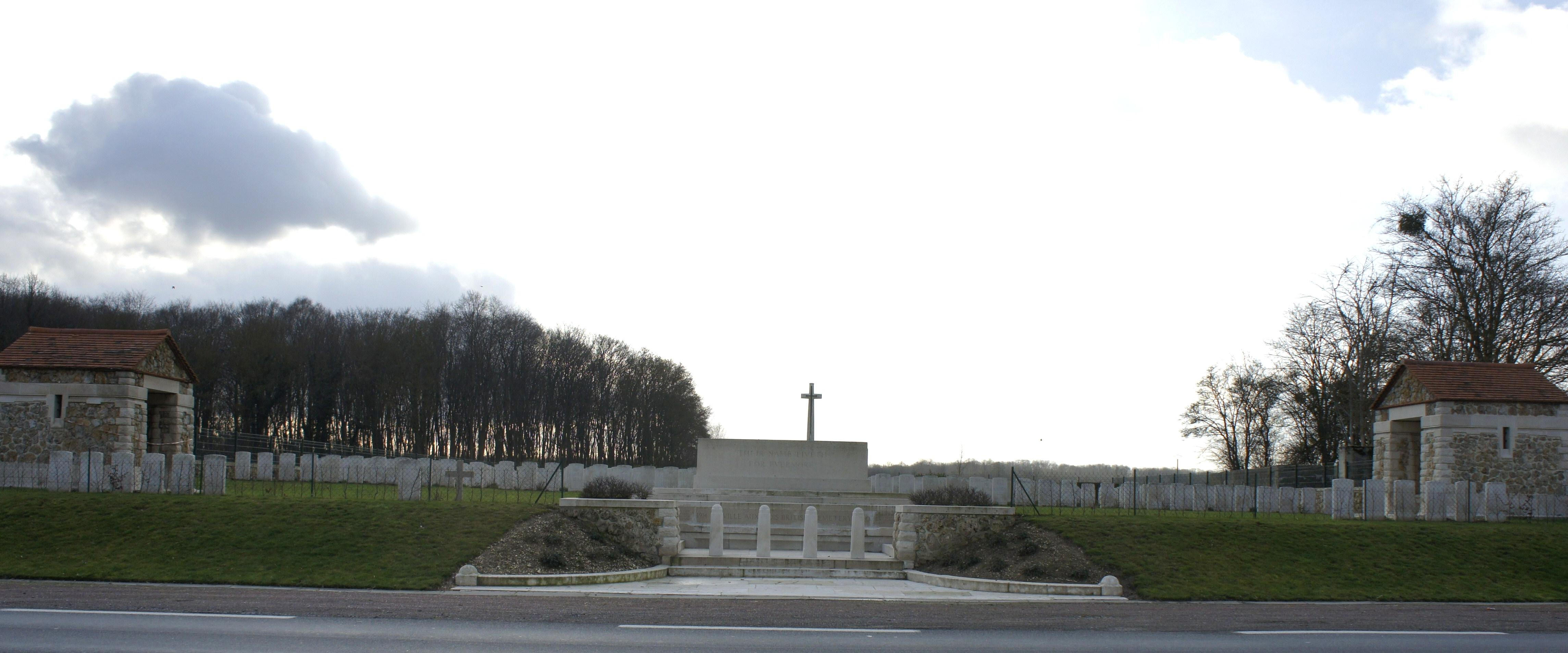 British Cemetery sur la commune de La Ville au Bois.